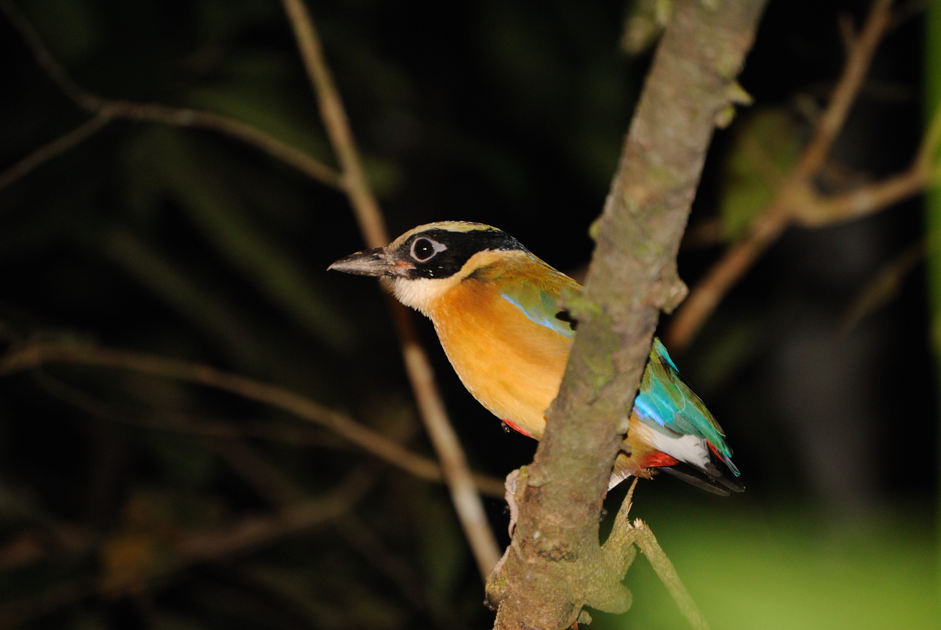 Blue-winged Pitta - Kinabatangan area - Sabah - Borneo - Malaysia